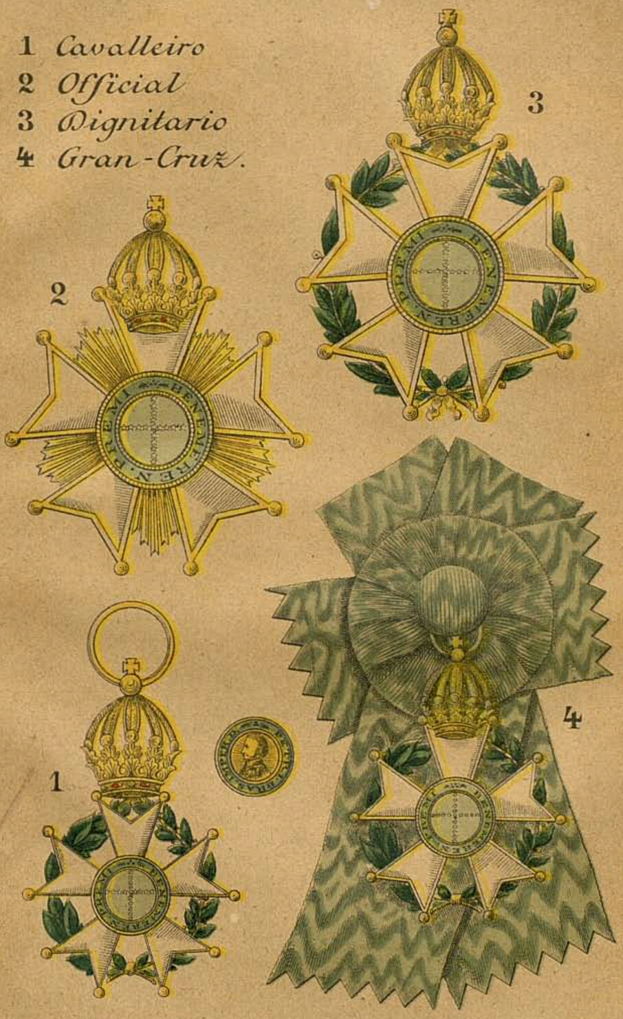 Brazylijski Cesarski Order Krzyża Południa